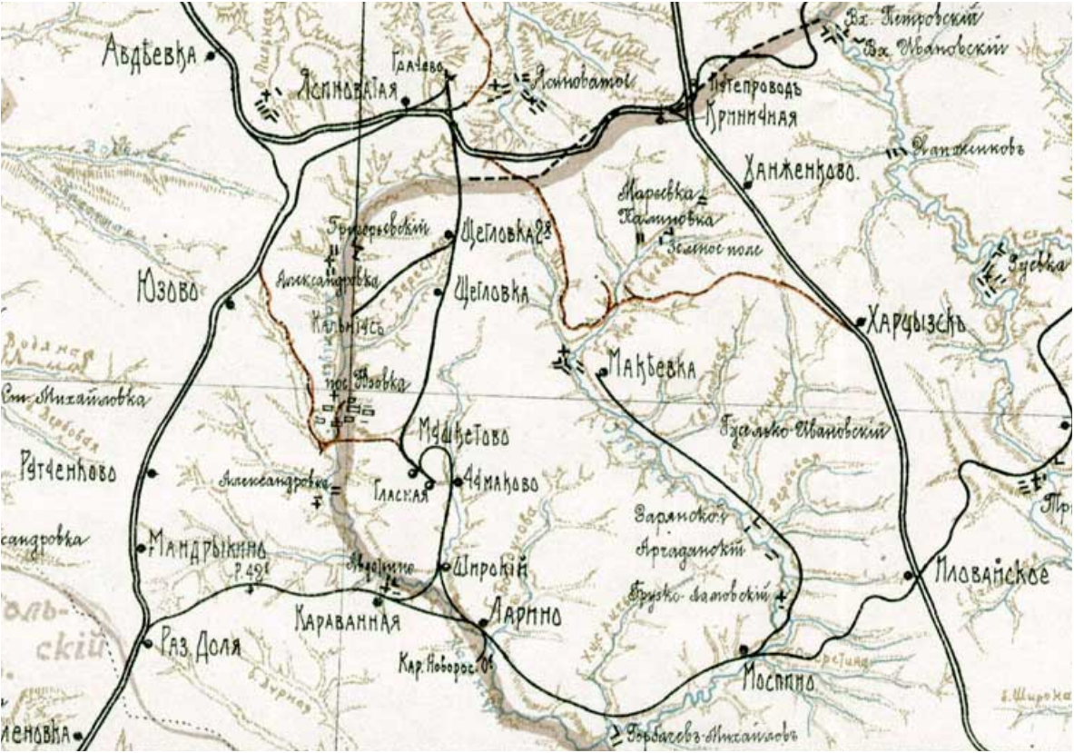 Богодухівська залізнична гілка Ясинувата - Мушкетове - Доля на схемі залізниць сучасної Донецько-Макіївської агломерації